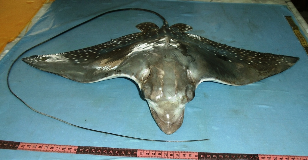 Скат рода пятнистых орляков